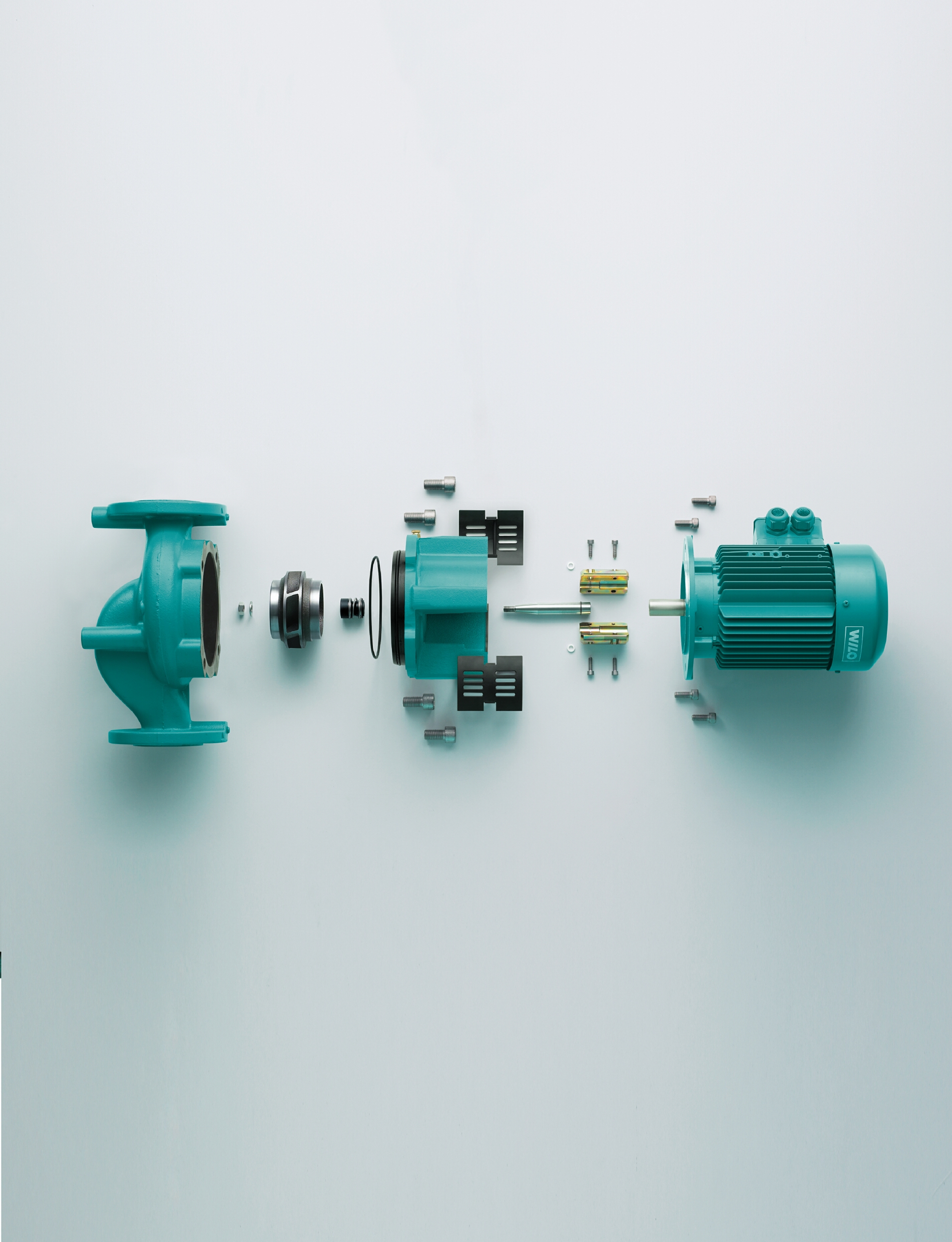 Budowa pompy dławnicowej Wilo-CronoLine-IL-E